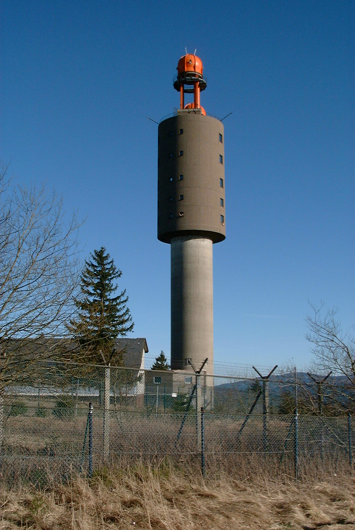 Der ehemalige Aufkärungsturm auf der Schalke im Harz vor der Sprengung